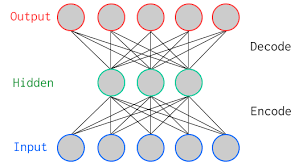 مكدسة ِAutoencoders